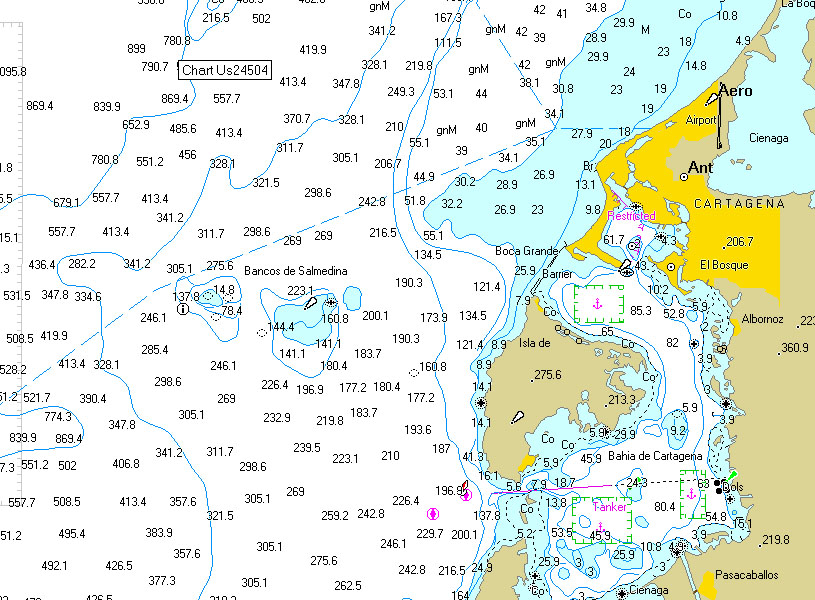 Salmedina-Cartagena Ubicación Bajo Salmedina en Cartagena Colombia.